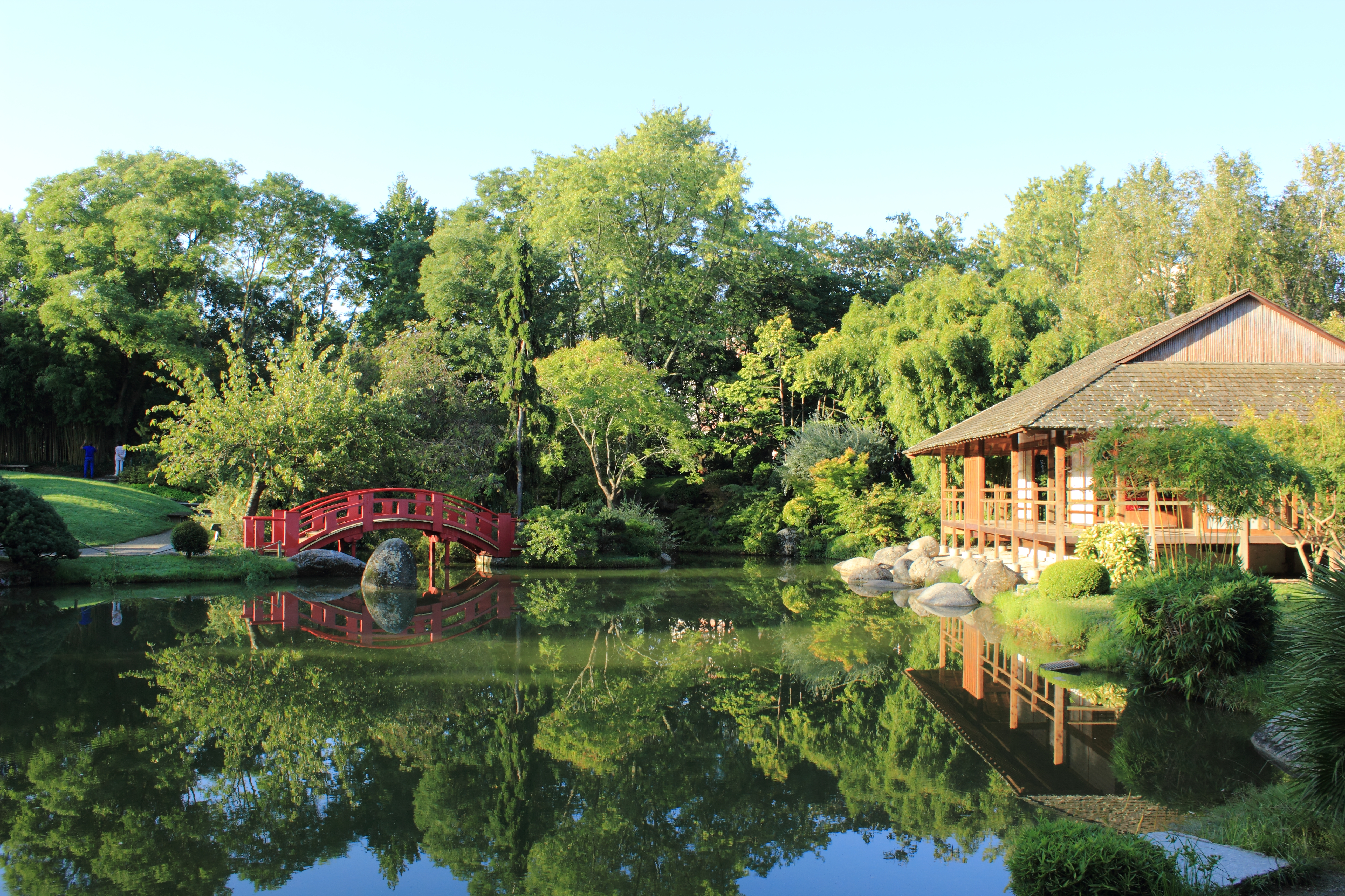 Lac et pavillon du thé, jardin japonais de Toulouse